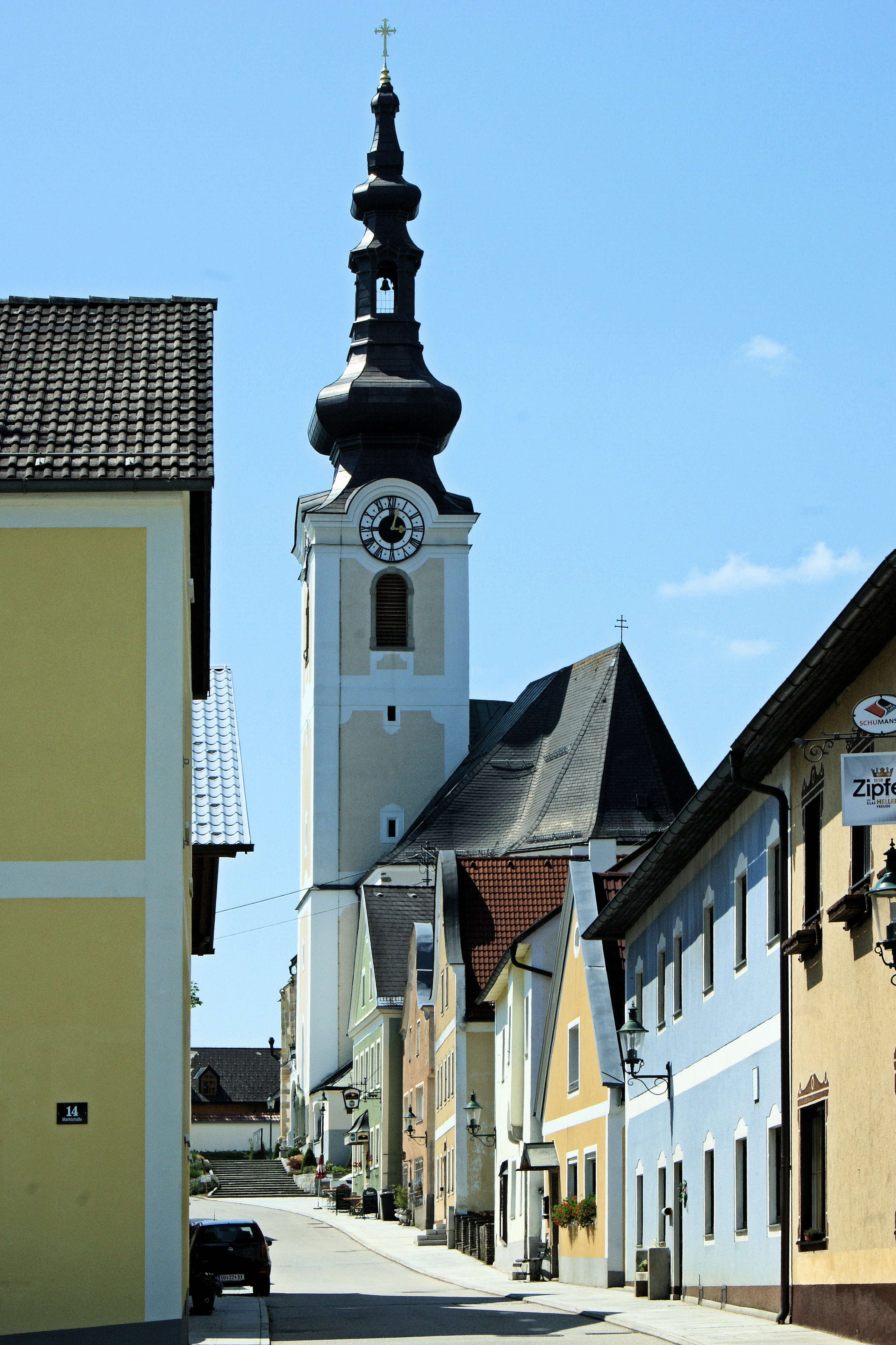 Kath. Pfarrkirche hl. Laurentius